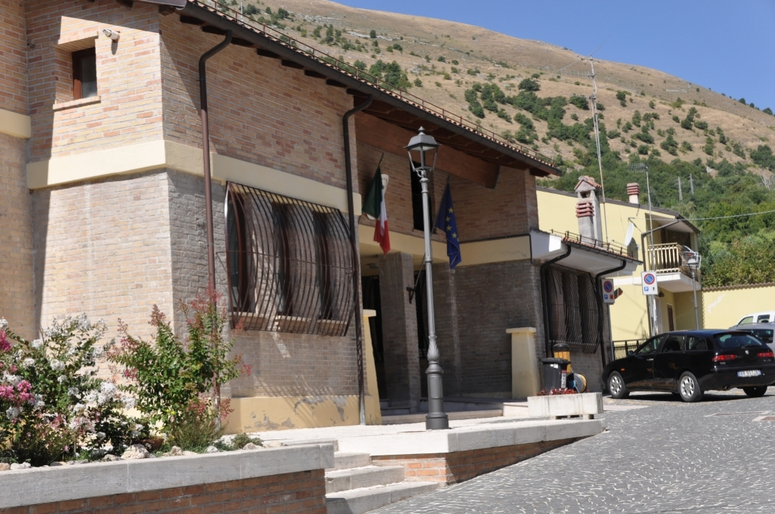 Cocullo 2012